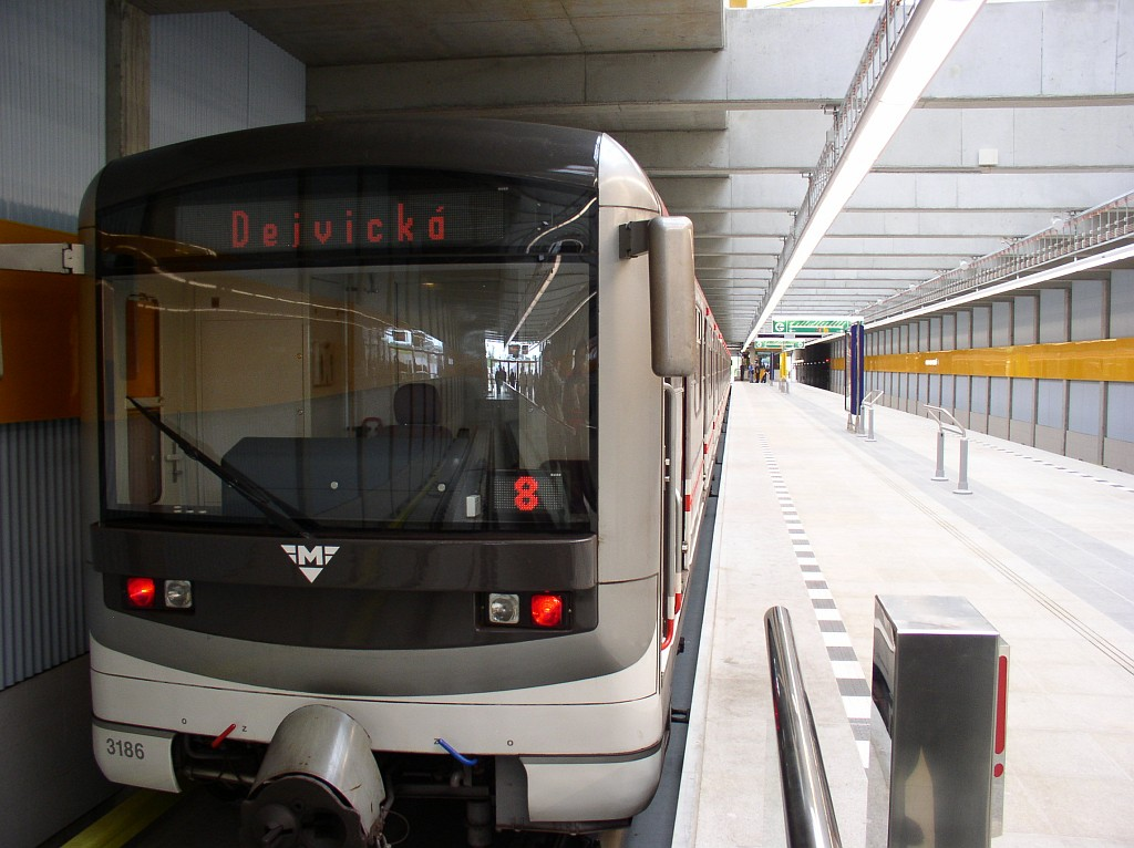 Metro station Depo Hostivař in Prague – Stanice metra Depo Hostivař